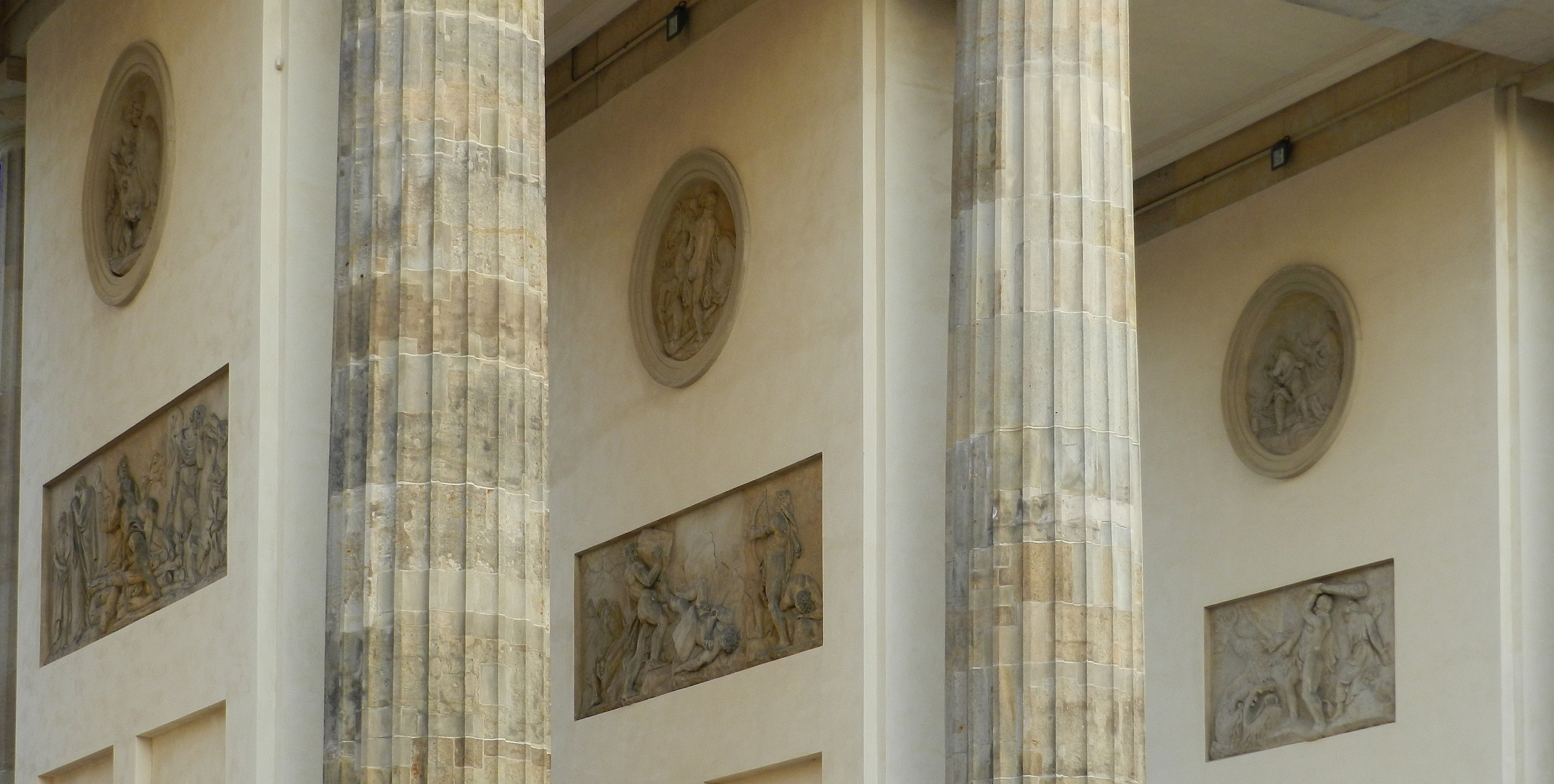 Reliefs in den Durchgängen des Brandenburger Tores in Berlin